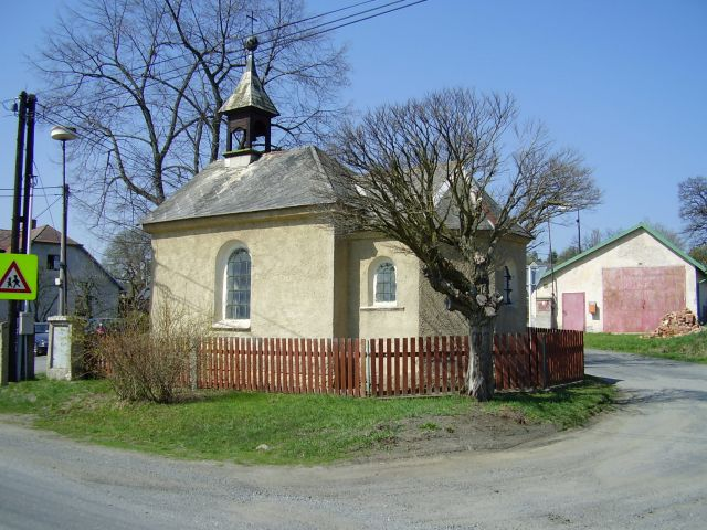 Kaple v Lazci